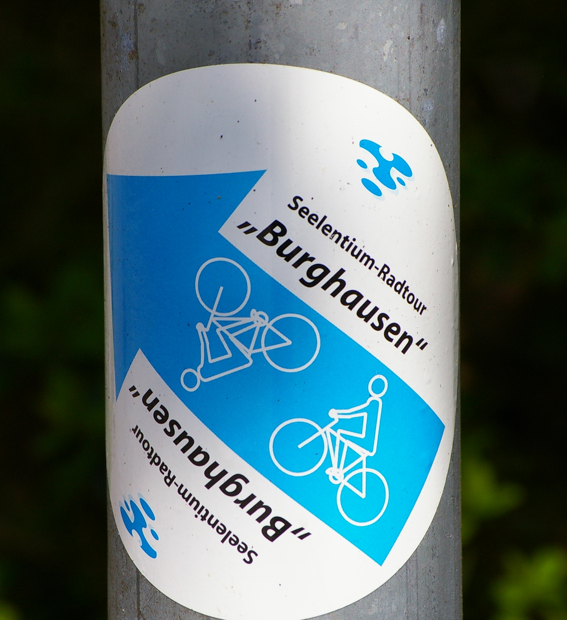 Radweg Hinweisaufkleber in der Tourismusregion Seelentium (Oberösterreich/Bayern)